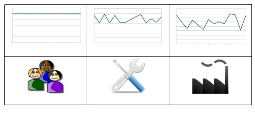 Rappresentazione dell'andamento della domanda lungo la catena distributiva